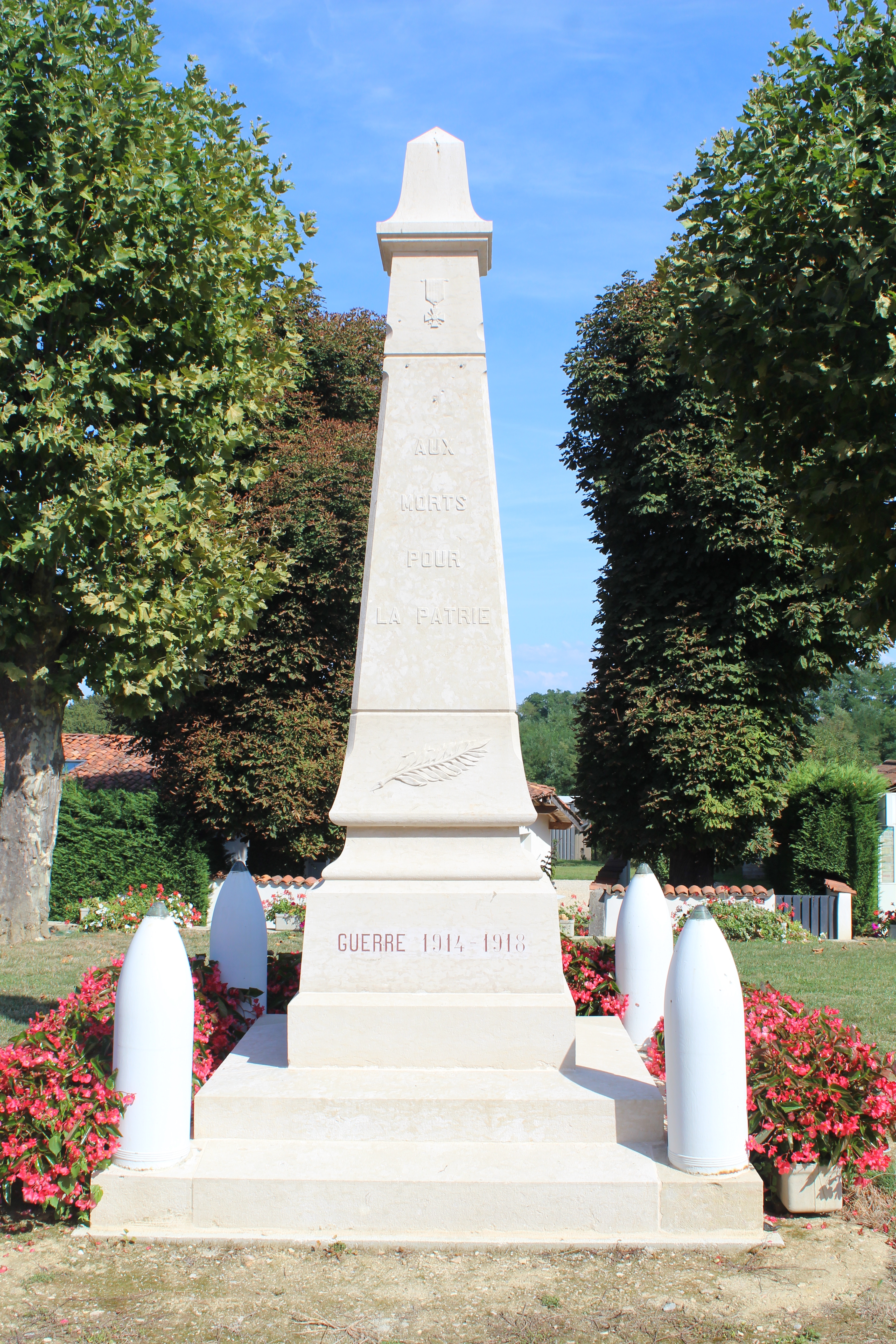 Monument en l'honneur des soldats de Montracol tués au combat.